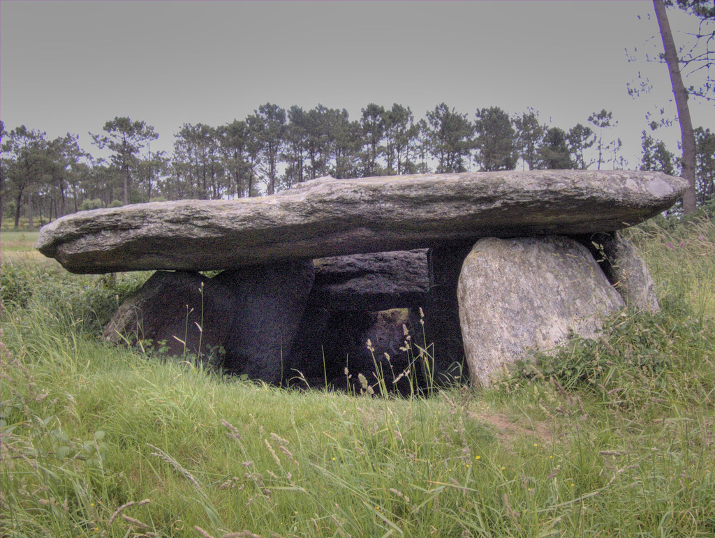 Dolmen da Pedra da Arca, Vimianzo